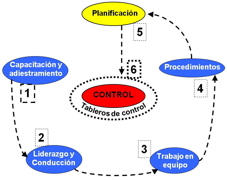 El Camino de los que debe hacer la organización para alcanzar el control de los procesos mas relevantes.